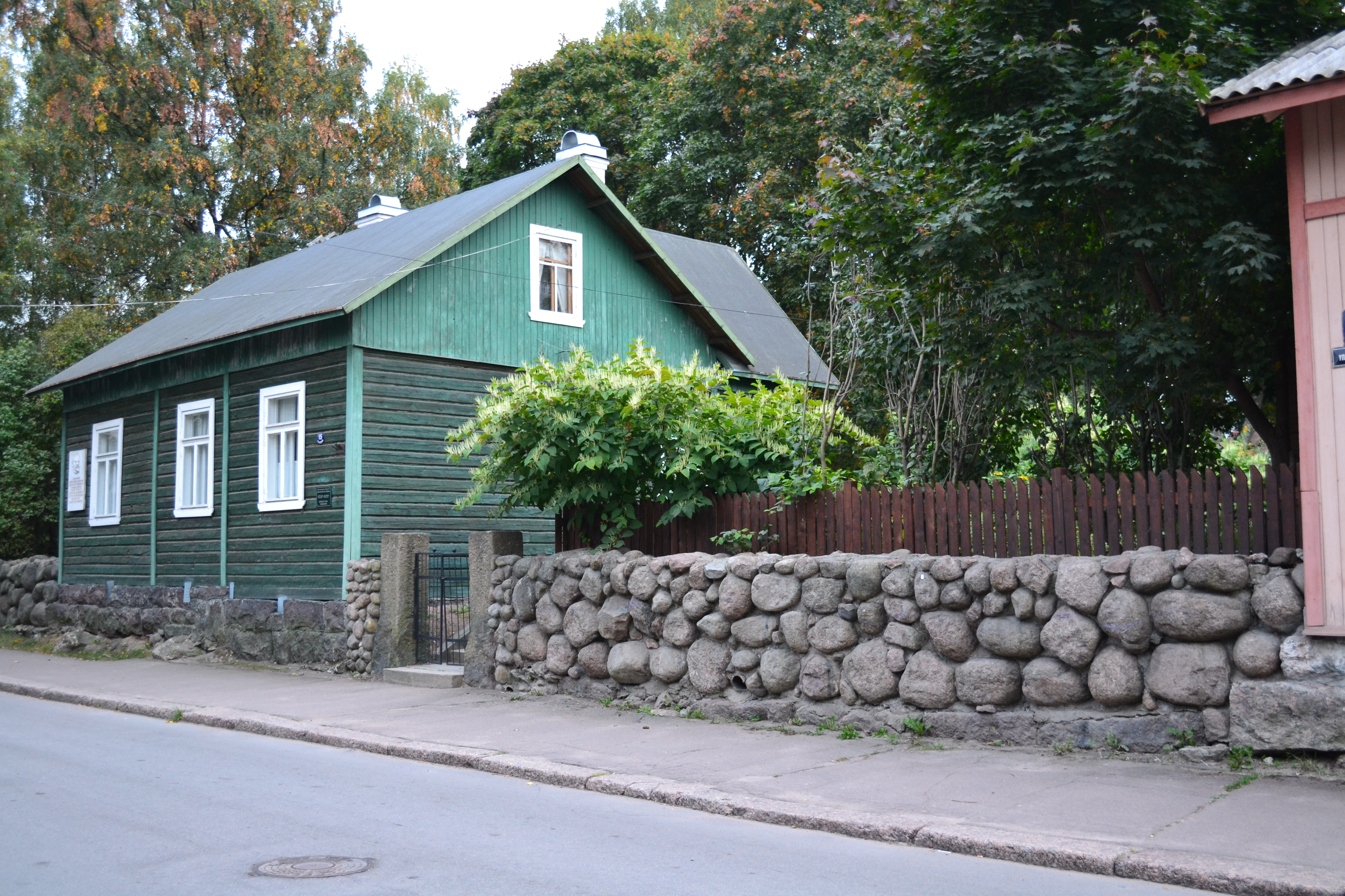 Дом, в котором жил и работал В. И. Ленин в 1917 году (Санкт-Петербург и Лен.область, Выборг, посёлок им. Ленина, улица Рубежная, 25)